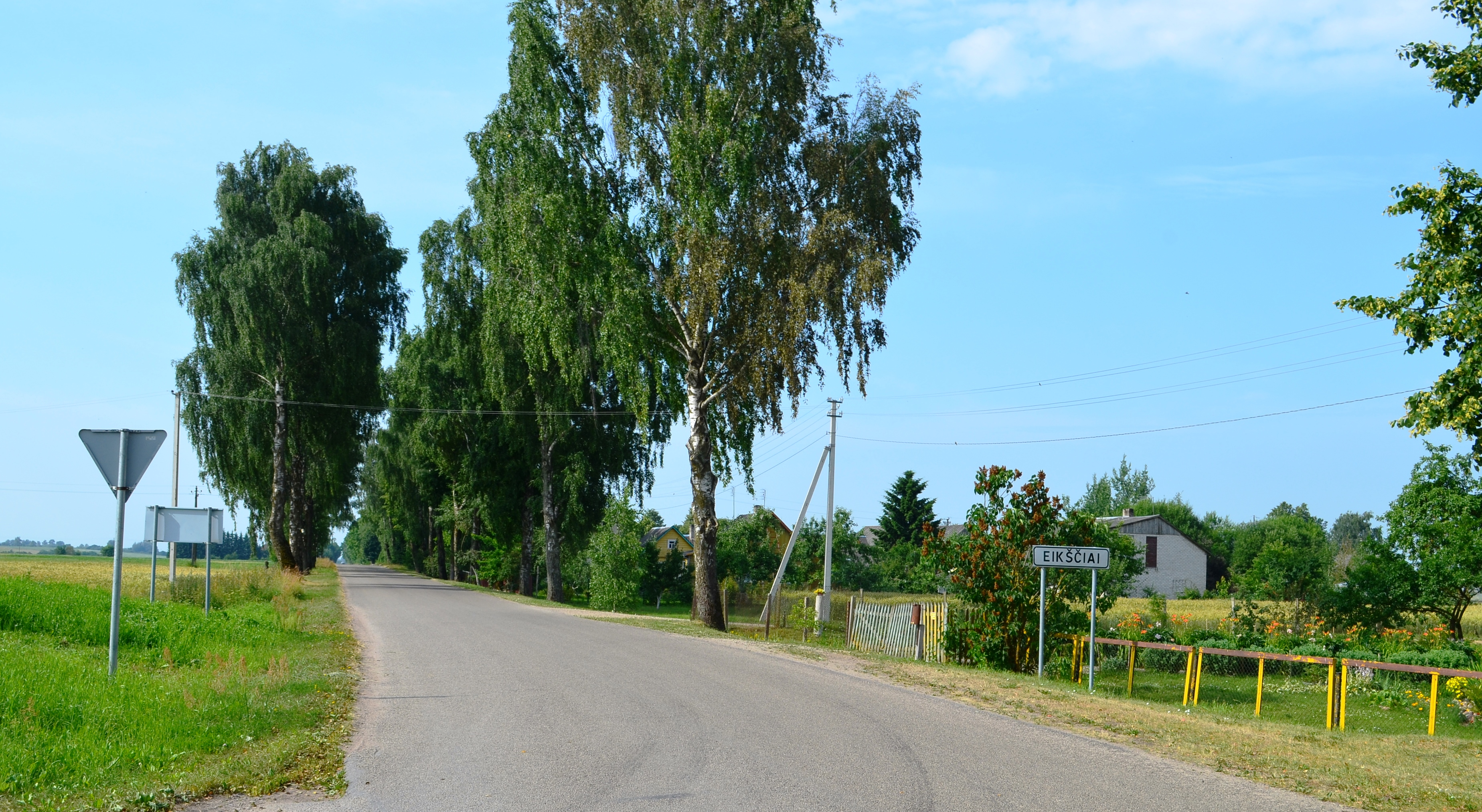 Eikščiai, Kauno raj.